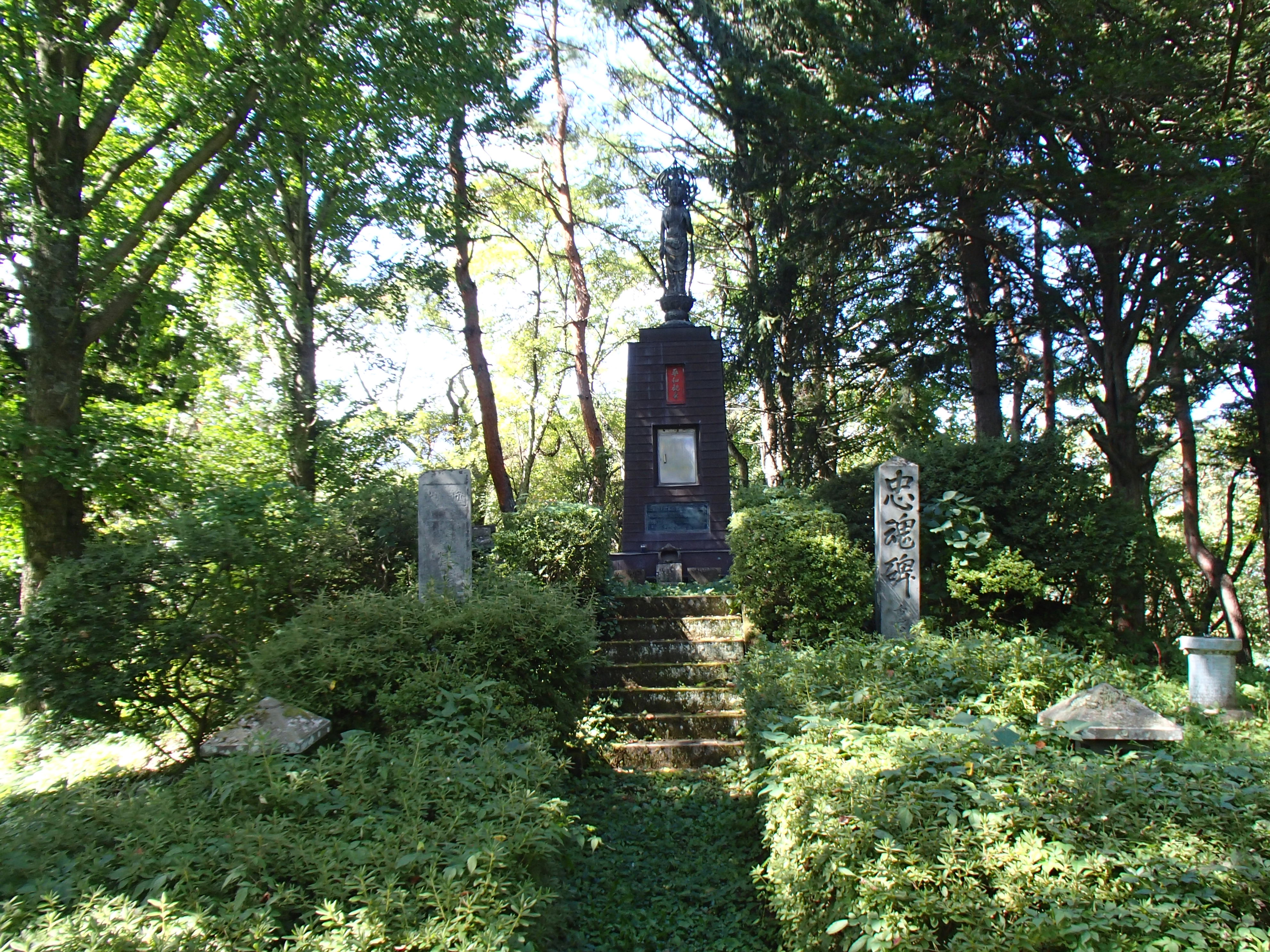 矢筒山平和観音